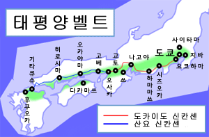 태평양 벨트 지도